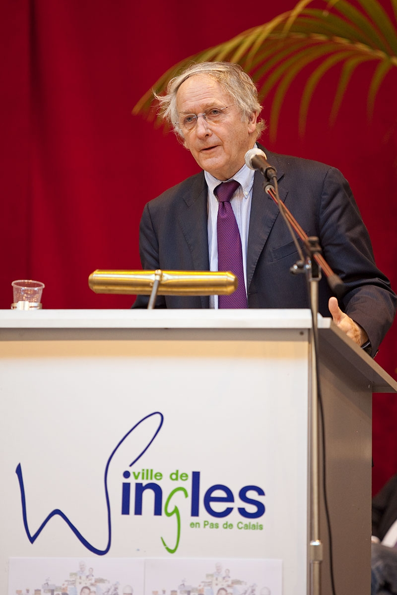 Photo de Daniel Percheron, président du Conseil régional Nord-Pas de Calais et sénateur du Pas-de-Calais à Wingles (Pas-de-Calais) le 26 septembre 2009.